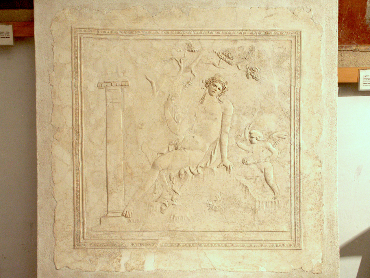 Bassorilievo proveniente da Villa Petraro